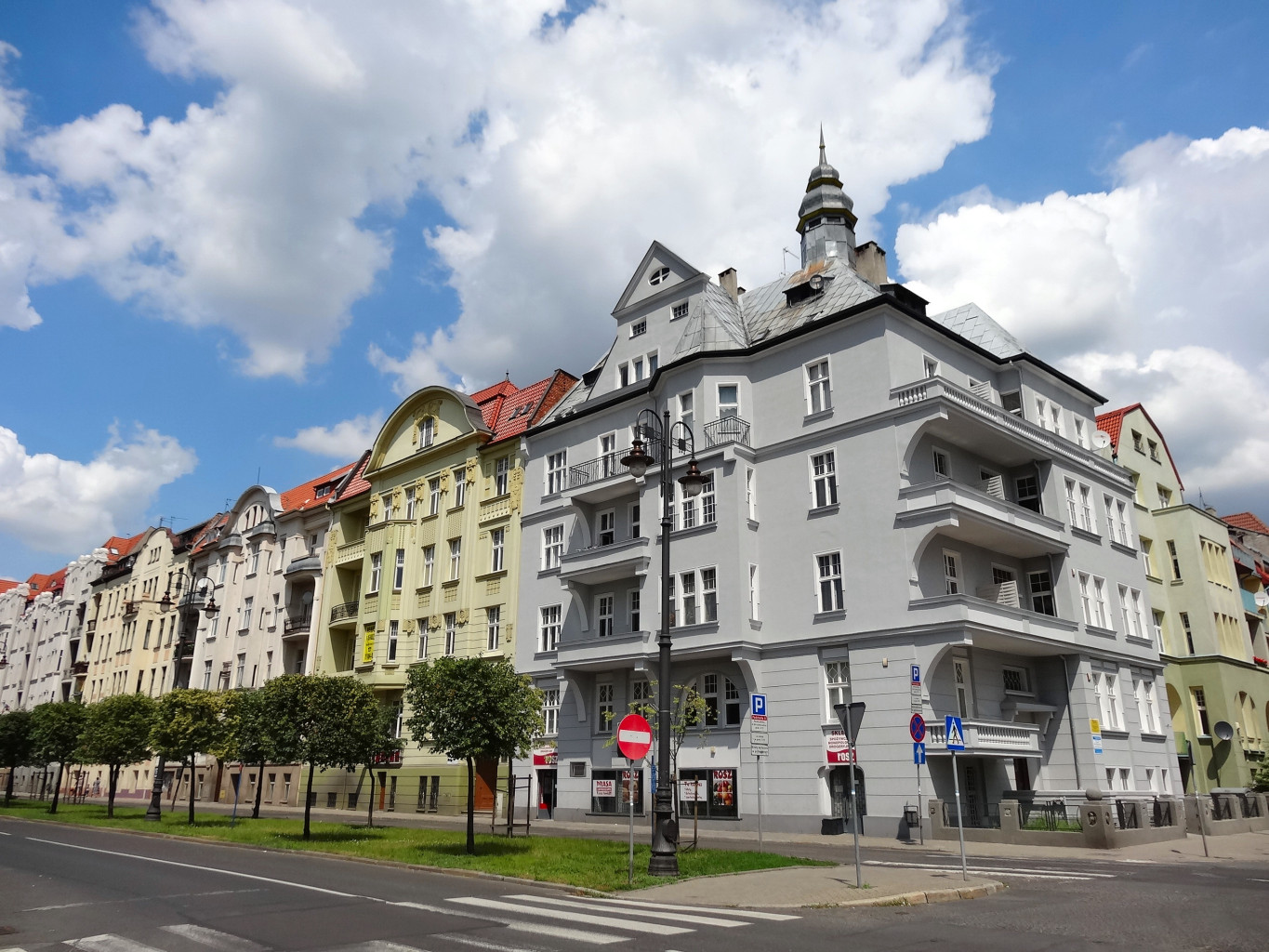 Aleja Adama Mickiewicza w Bydgoszczy